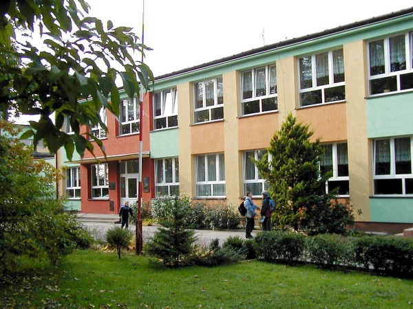 szkoła w Bierkowie Szkoła Podstawowa w Bierkowie Ceranowski Piotr 2003.10.22